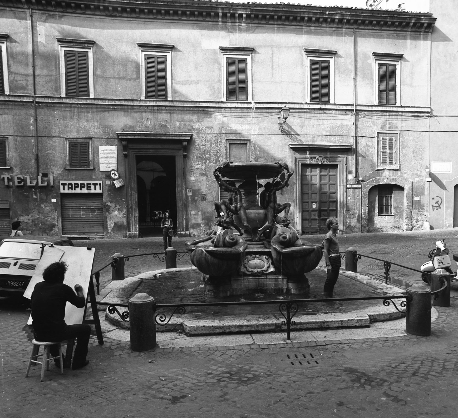 Piazza Mattei fontana delle tartarughe